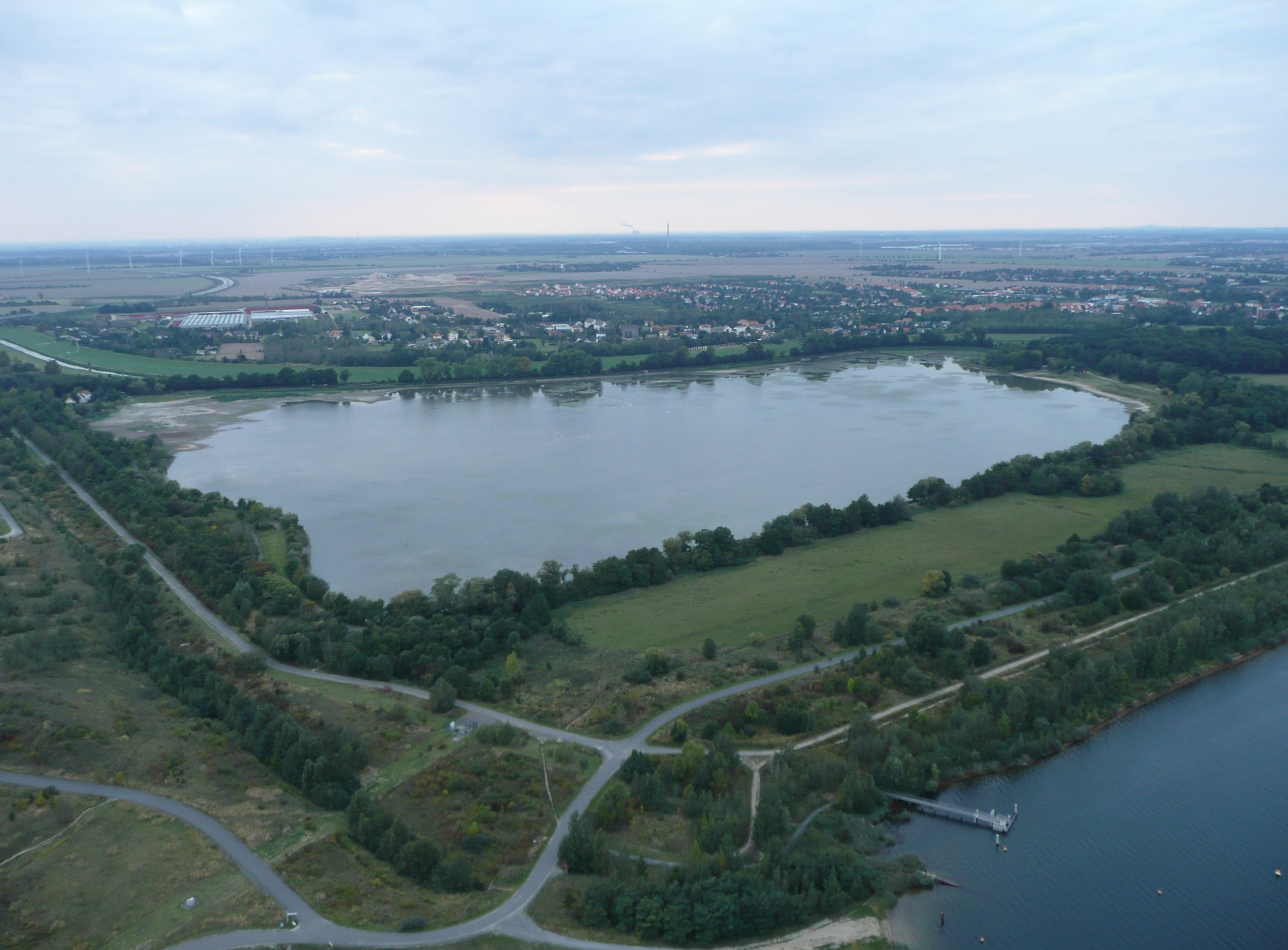 Elsterstausee, Stausee Bösdorf aus der Luft mit Blick nach Westen.